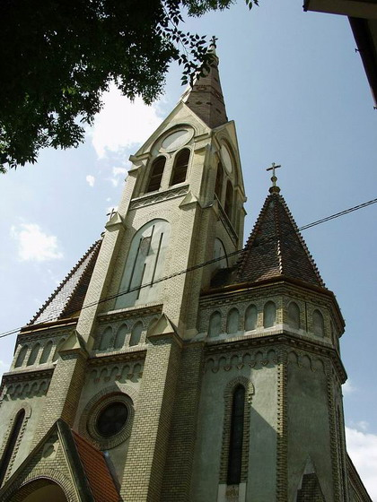 Luteránský evangelický chrám v Oradei, Rumunsko